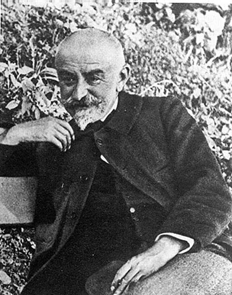 huysmans sur un banc